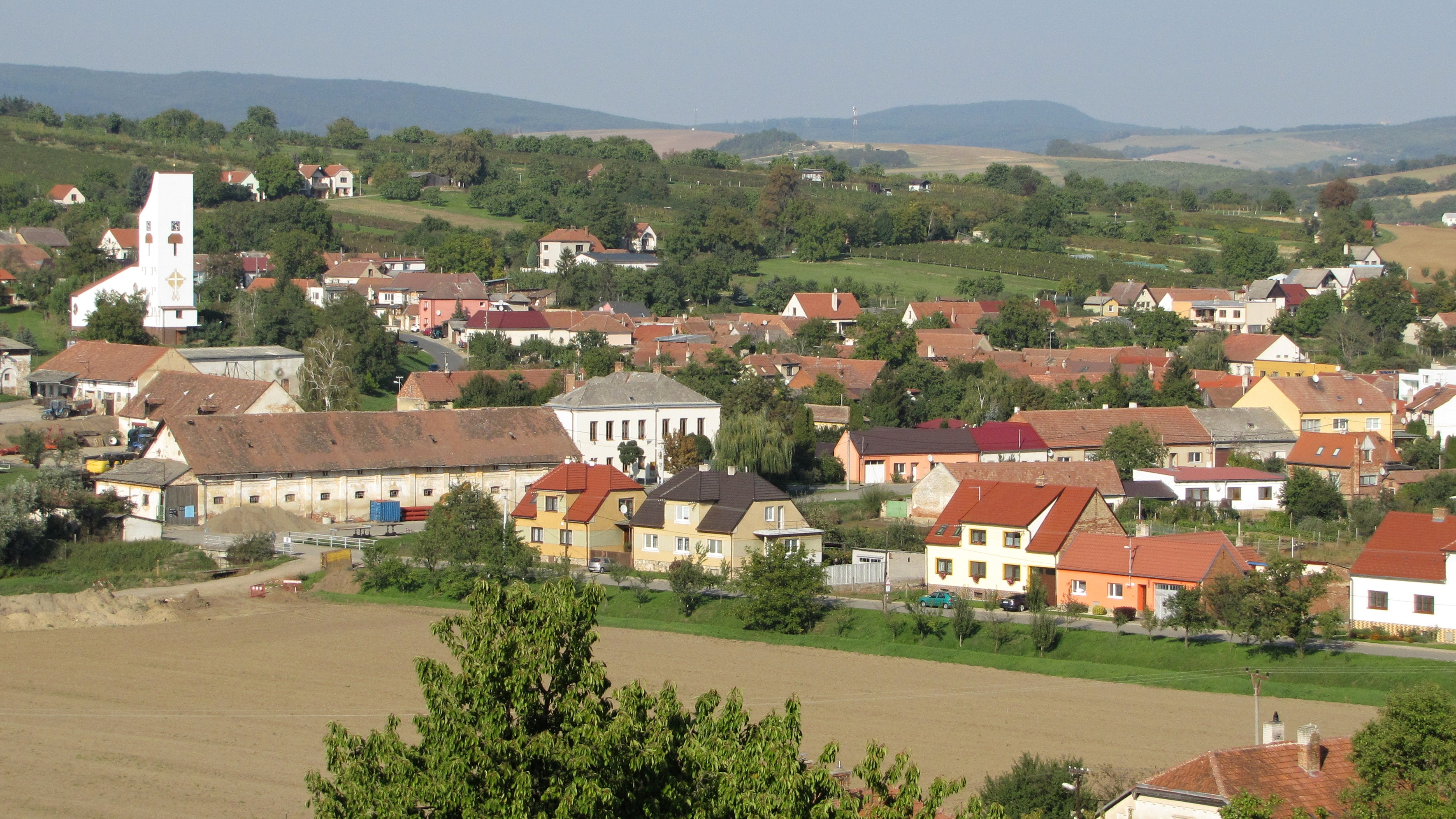 Pohled na Žádovice od jihovýchodu (kostel sv. Jana Nepomuckého, Obecní úřad, v pozadí pohoří Chřiby